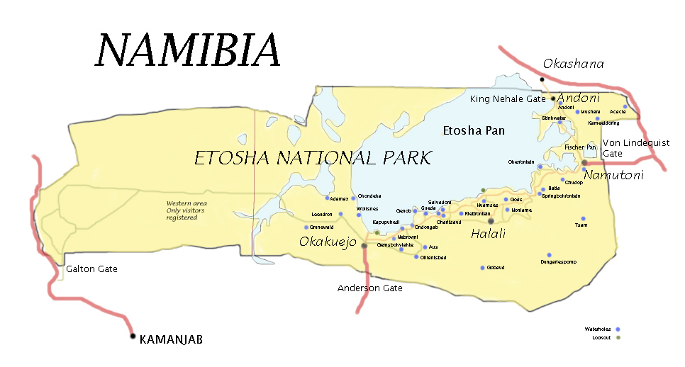 Mapa del parque nacional de Etosha